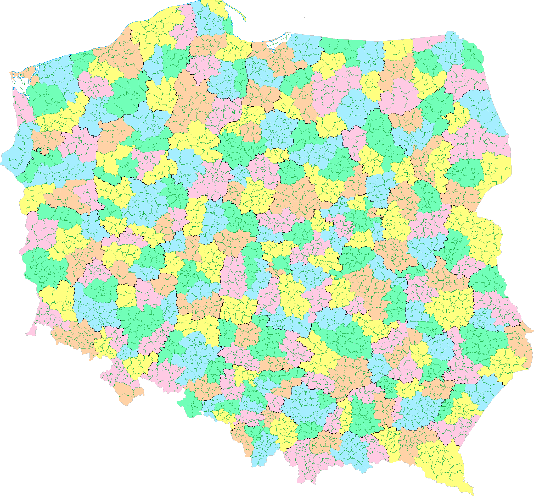 Rejony funkcjonujące w Polsce w okresie 1990-1998 (stan na 31 XII 1998).